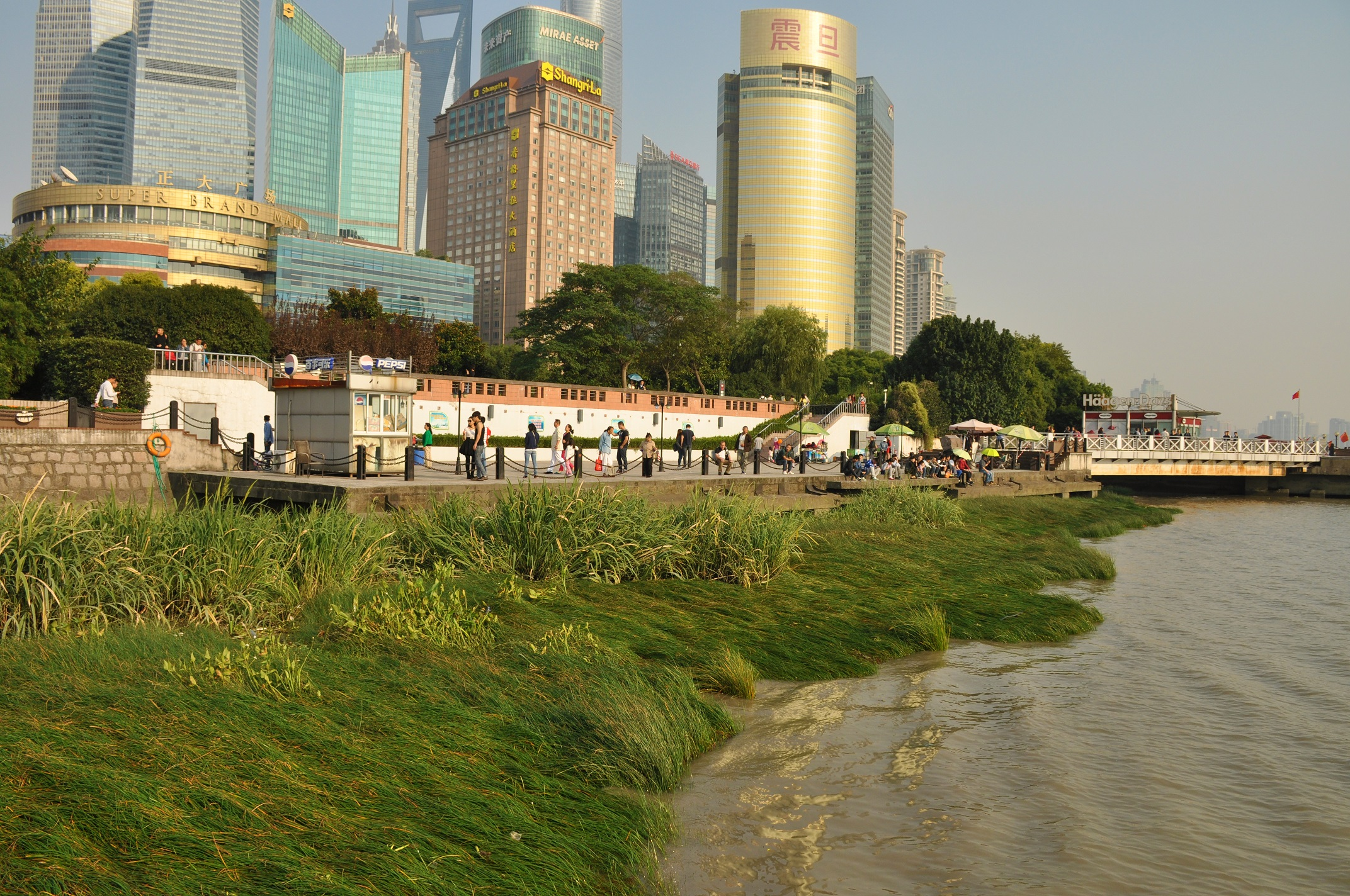 陆家嘴轮渡站遗址